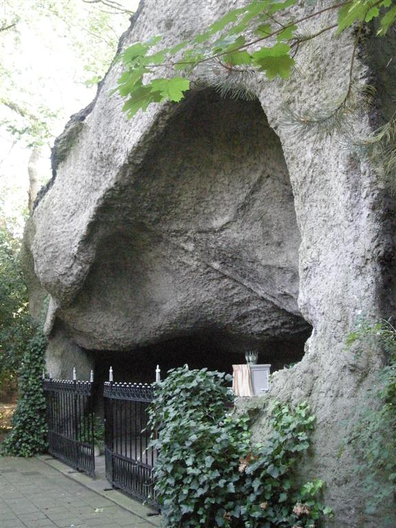 Lourdesgrot